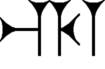 Cuneiform sign